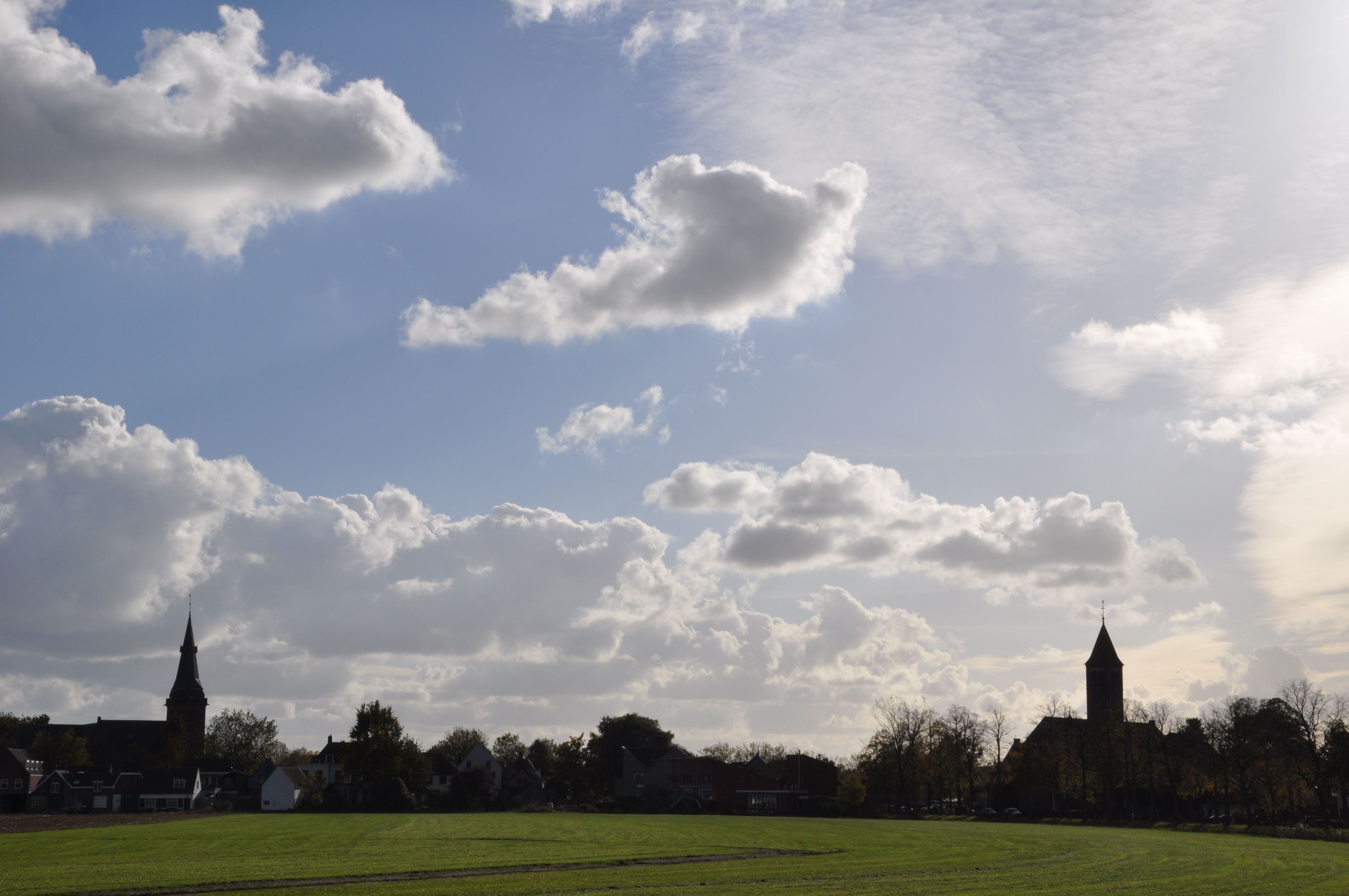 De skyline van harmelen, gezien vanaf Huis te Harmelen.